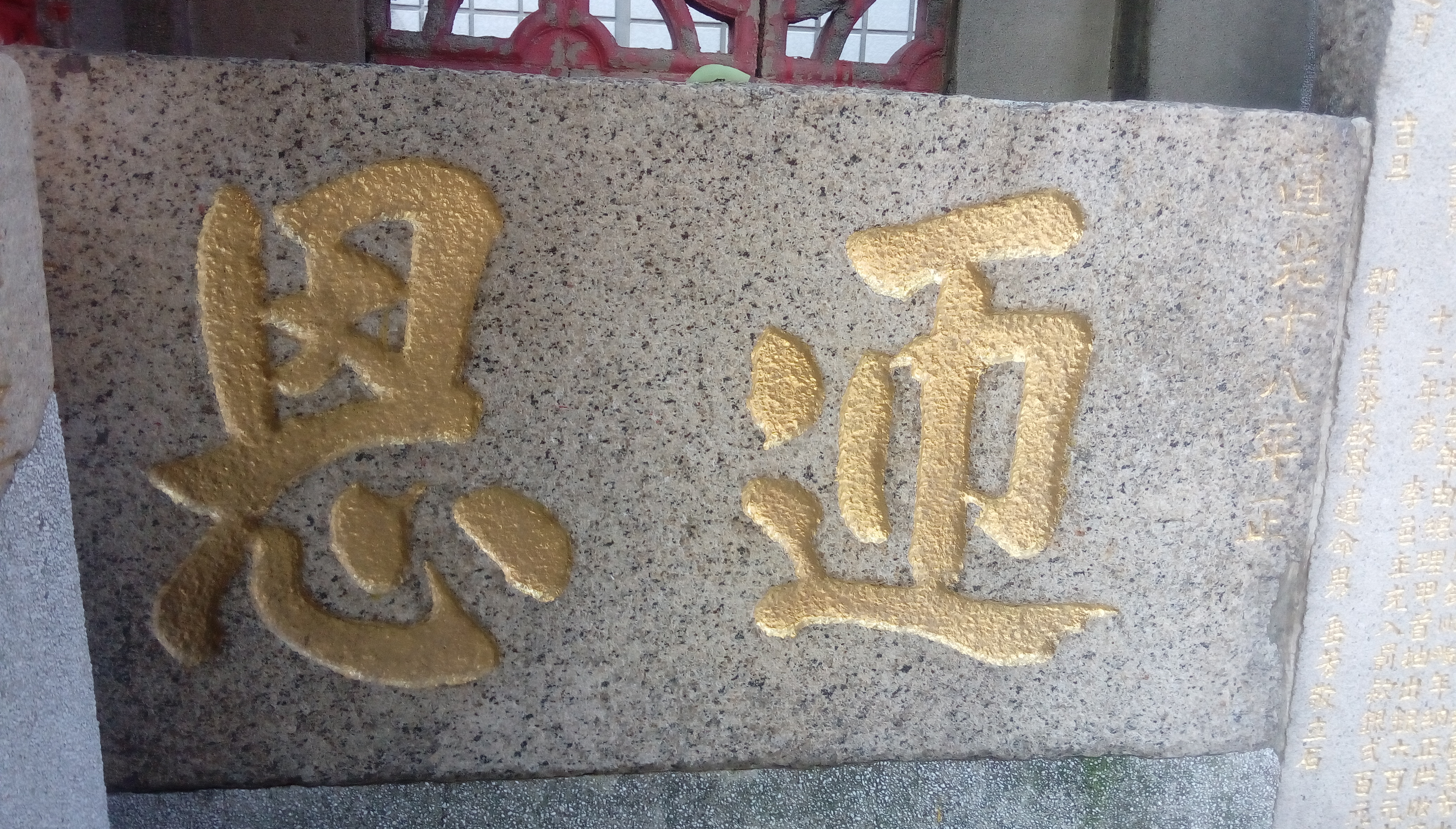 中文（台灣）: 曹公廟廟埕旁門額